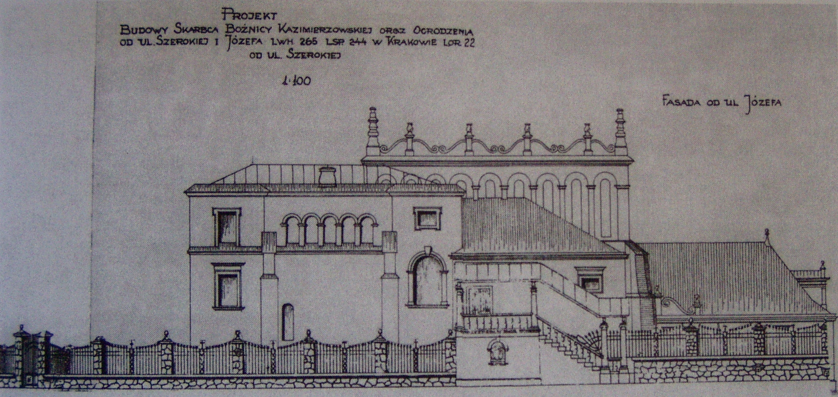 Projekt ogrodzenia wokół zachodniej części Starej Synagogi w Krakowie